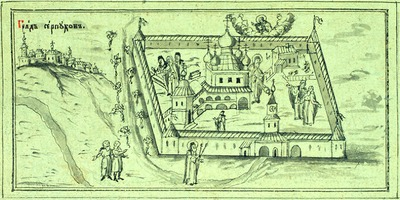 Высоцкий монастырь Серпухов. Нач. XIX в.